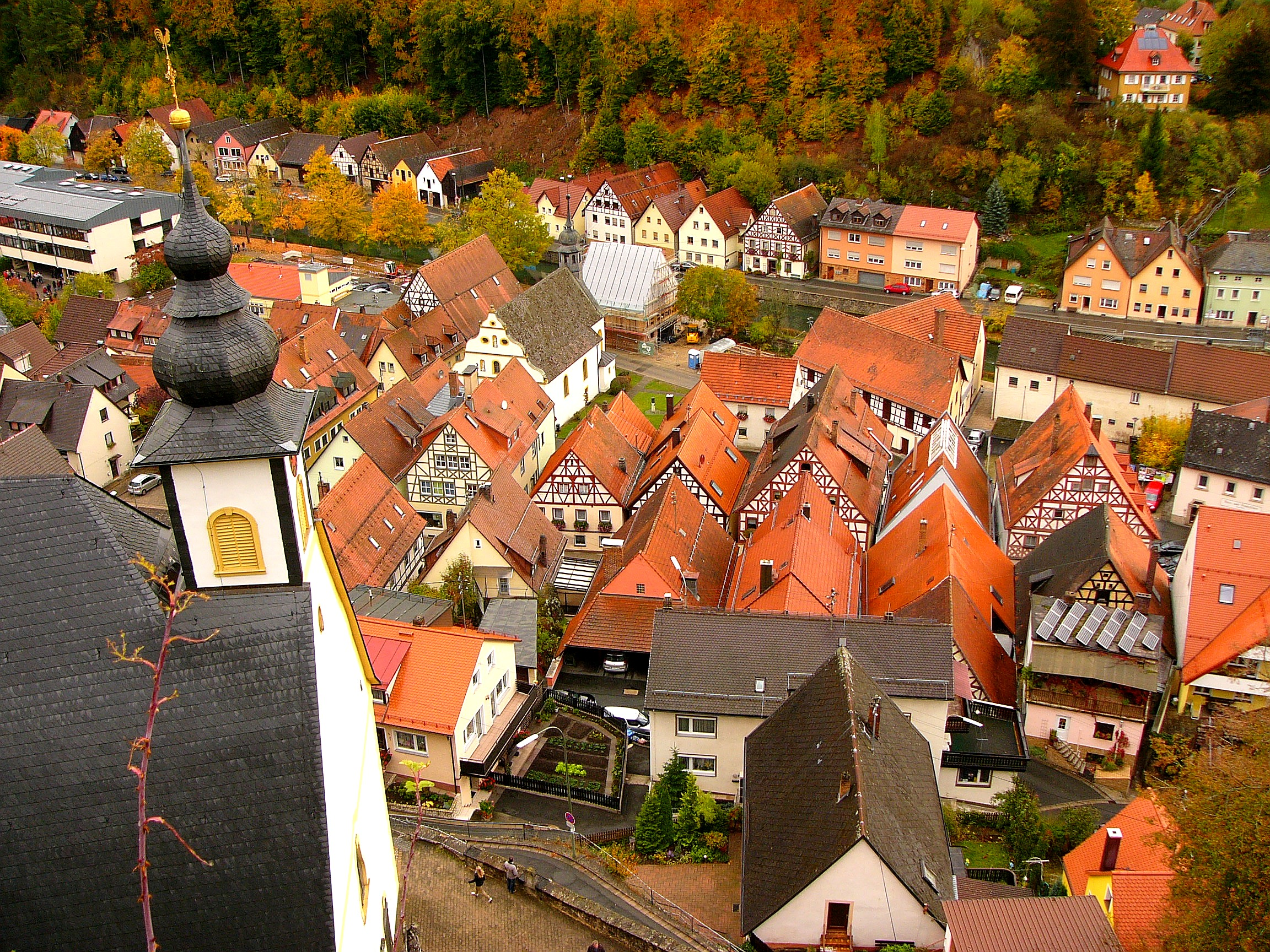 Der Ort Waischenfeld ist im Anschluss an die Burg entstanden. Das Dorf wurde 1315 zur Stadt erhobenThis is a photograph of an architectural monument.